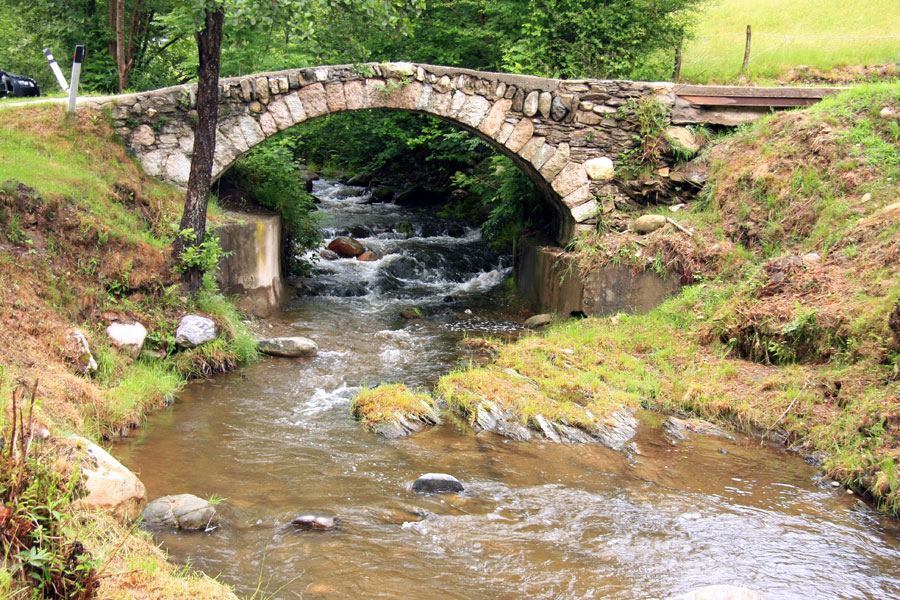 Scorcio del Torrente Agogna nel suo tratto montano nei pressi di Sovazza, frazione del comune di Armeno (NO)